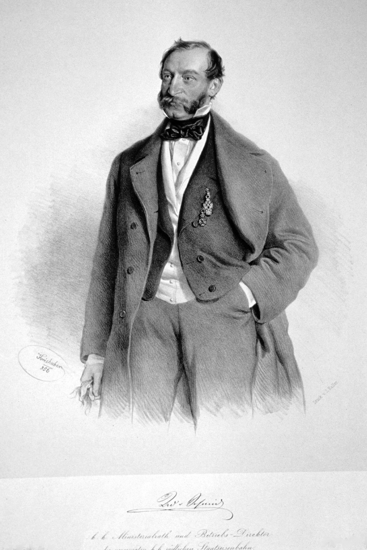 Adalbert von Schmid (1804-1860), Betriebsdirektor der k. k. Südbahn, Erfinder, Techniker. Lithographie von Josef Kriehuber, 1856